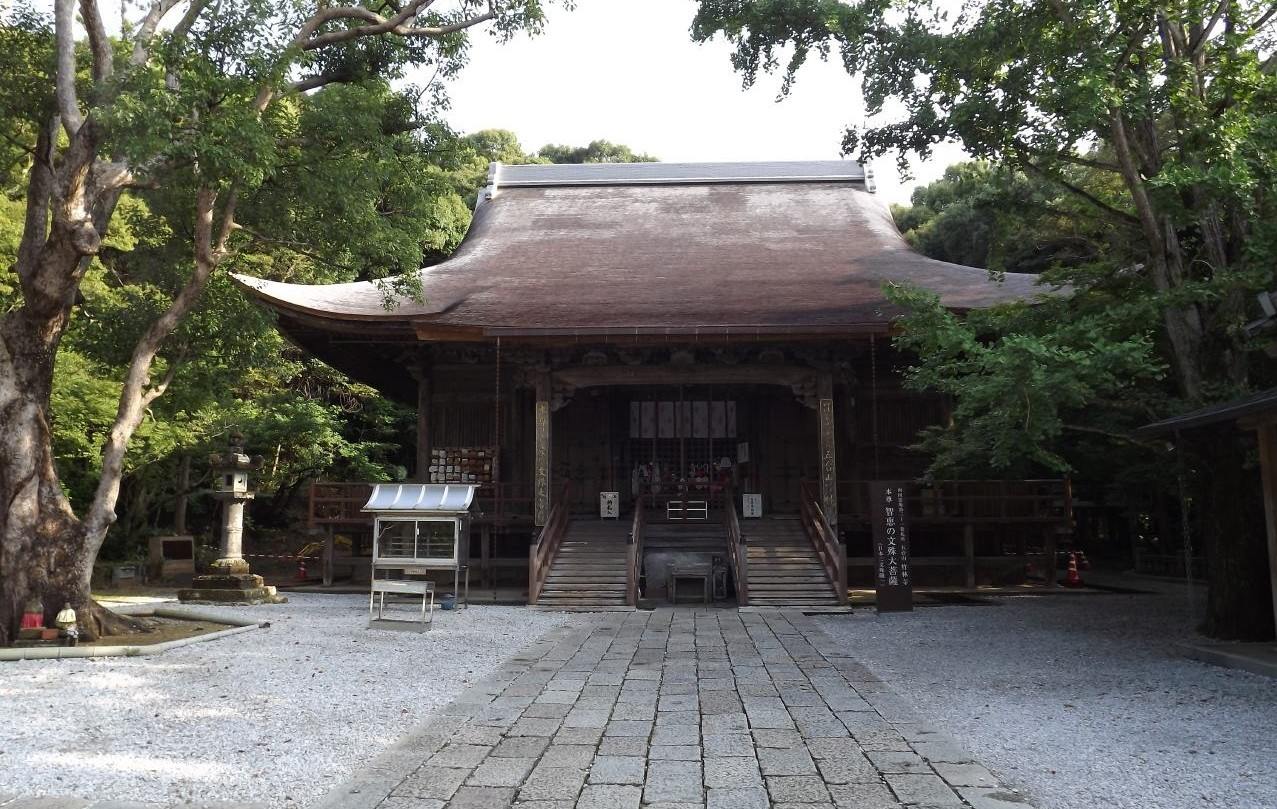 本堂屋根の修繕直後の画像